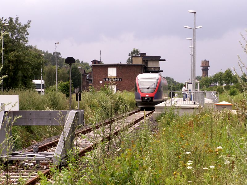 Bf Alsdorf